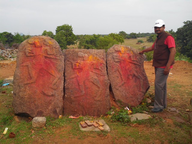 కూసుమంచి గణపేశ్వరాలయం ఆవరణకు దగ్గరలో వున్న వీరగల్లులు